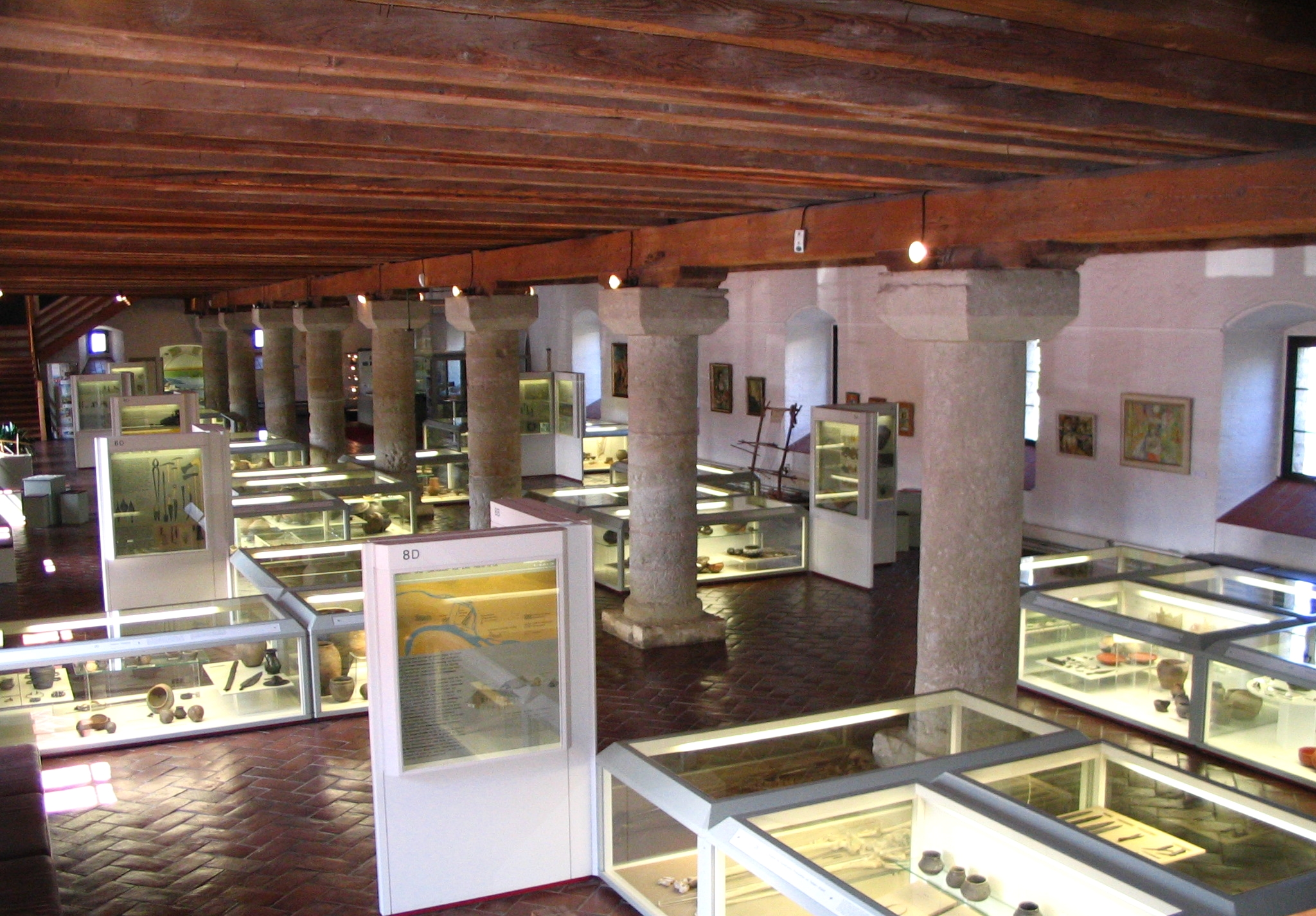 Stadt Kelheim, Niederbayern: Herzogskasten, städtischer Getreidespeicher aus dem 15. Jahrhundert; nun archäölogisches Museum